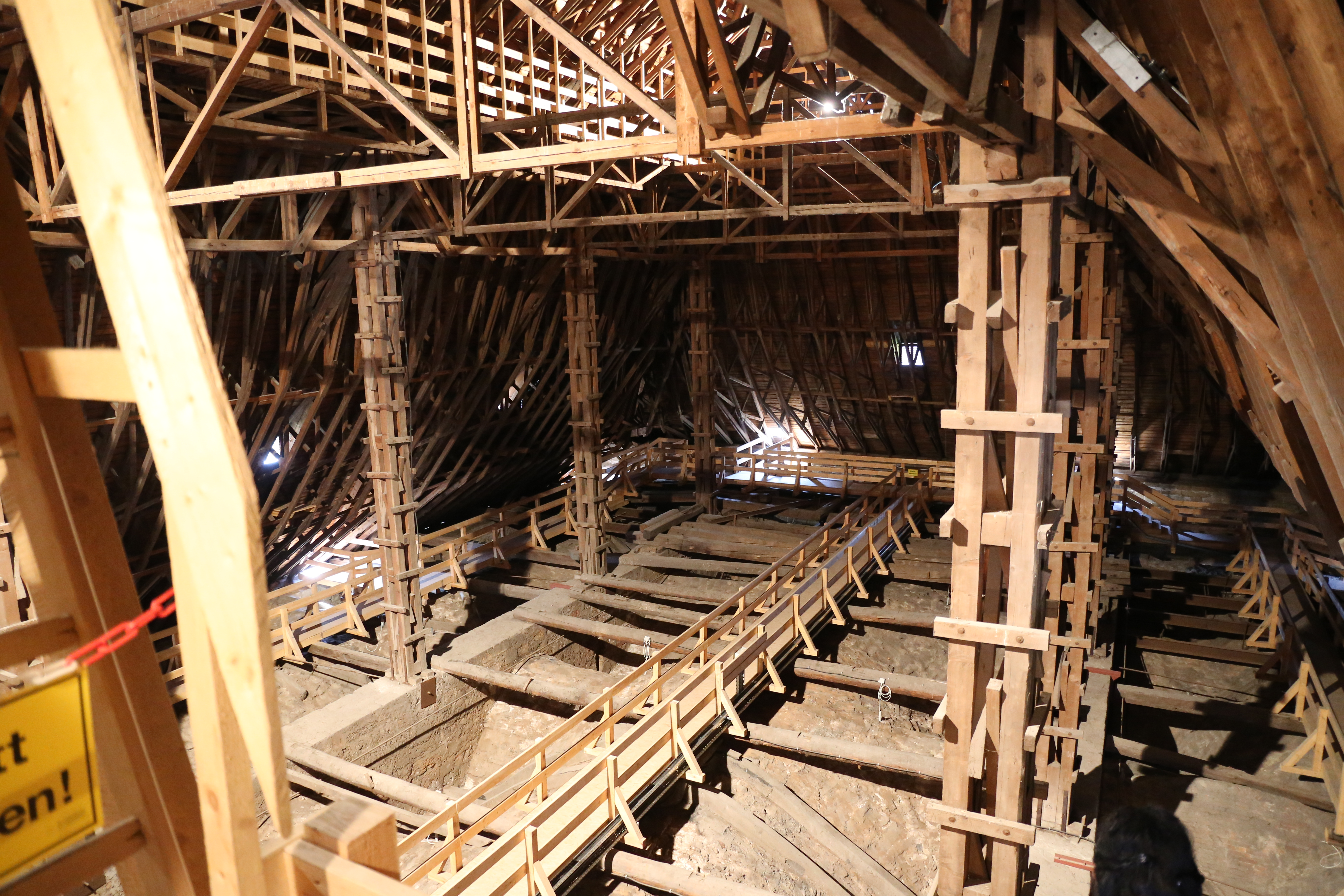 Unter dem Dach des Nordhäuser Doms